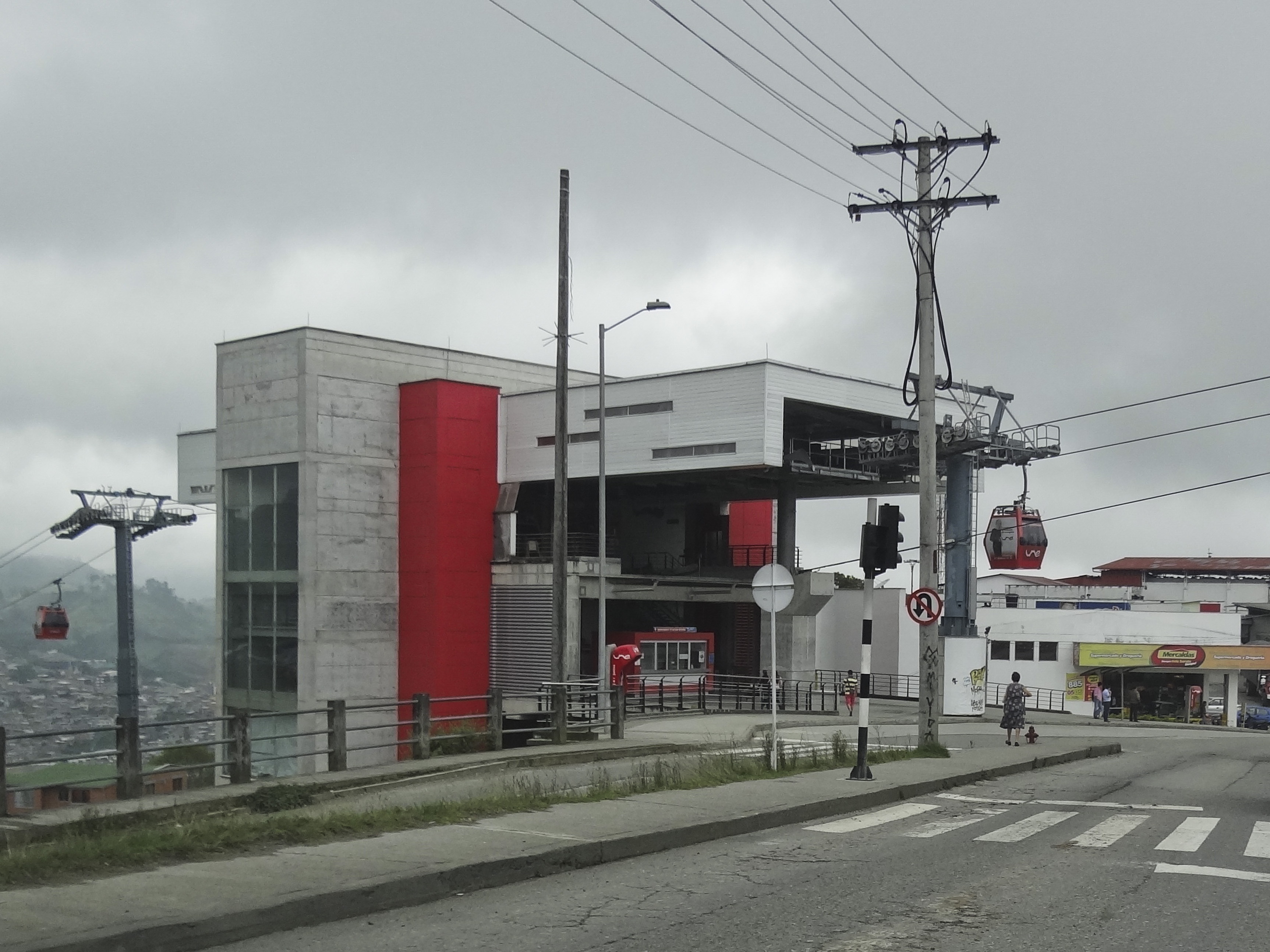 Estación del Cable Aéreo de Manizales, departamento de Caldas, Colombia